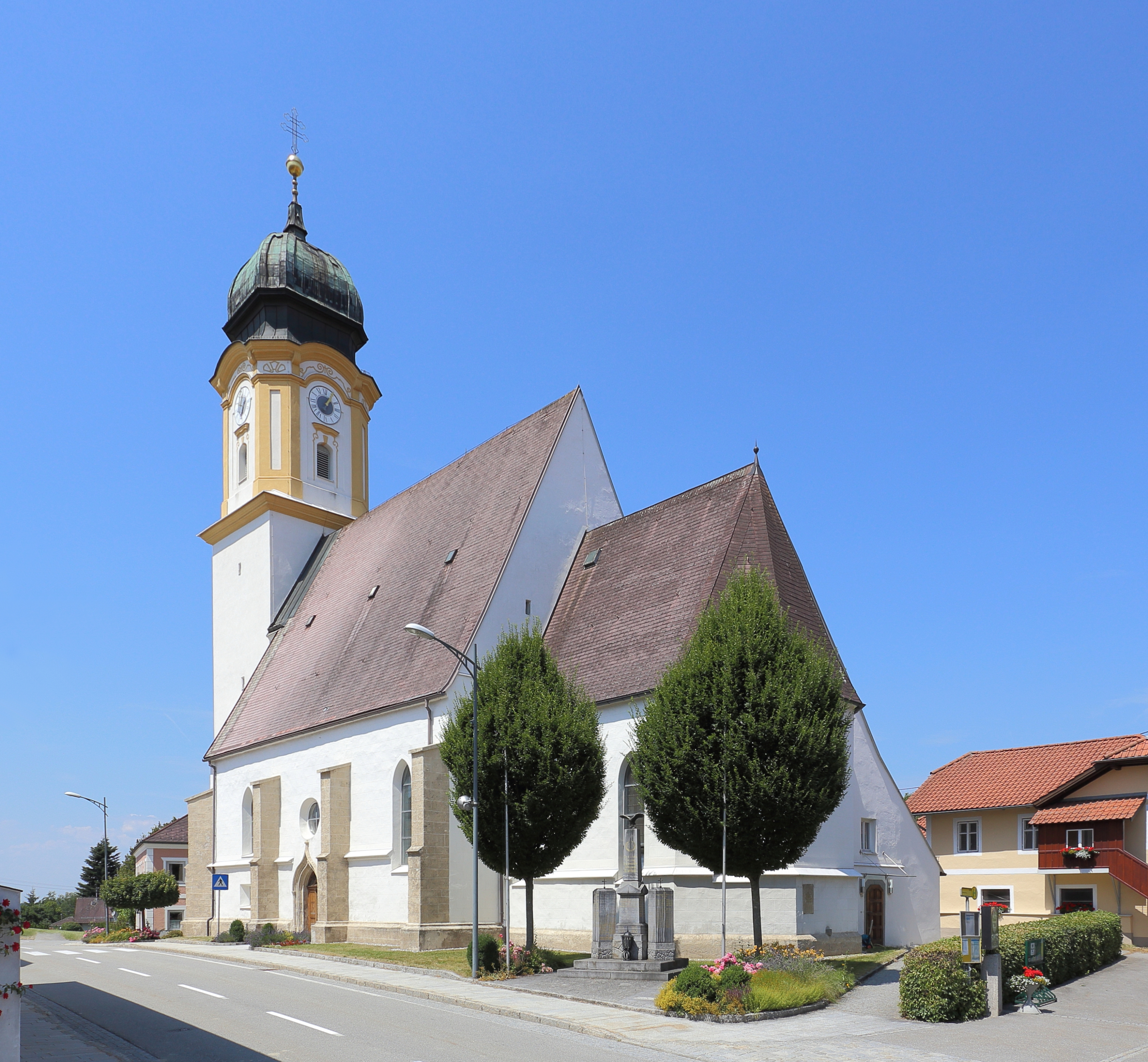 Katholische Pfarrkirche St. Willibald der oberösterreichischen Gemeinde St. Willibald. Eine spätgotische zweischiffige Hallenkirche und ehemalige Wallfahrtskirche mit einer großteils neugotischen Einrichtung. Der Westturm ist gotisch und hat eine barocke Glockenstube (1733).